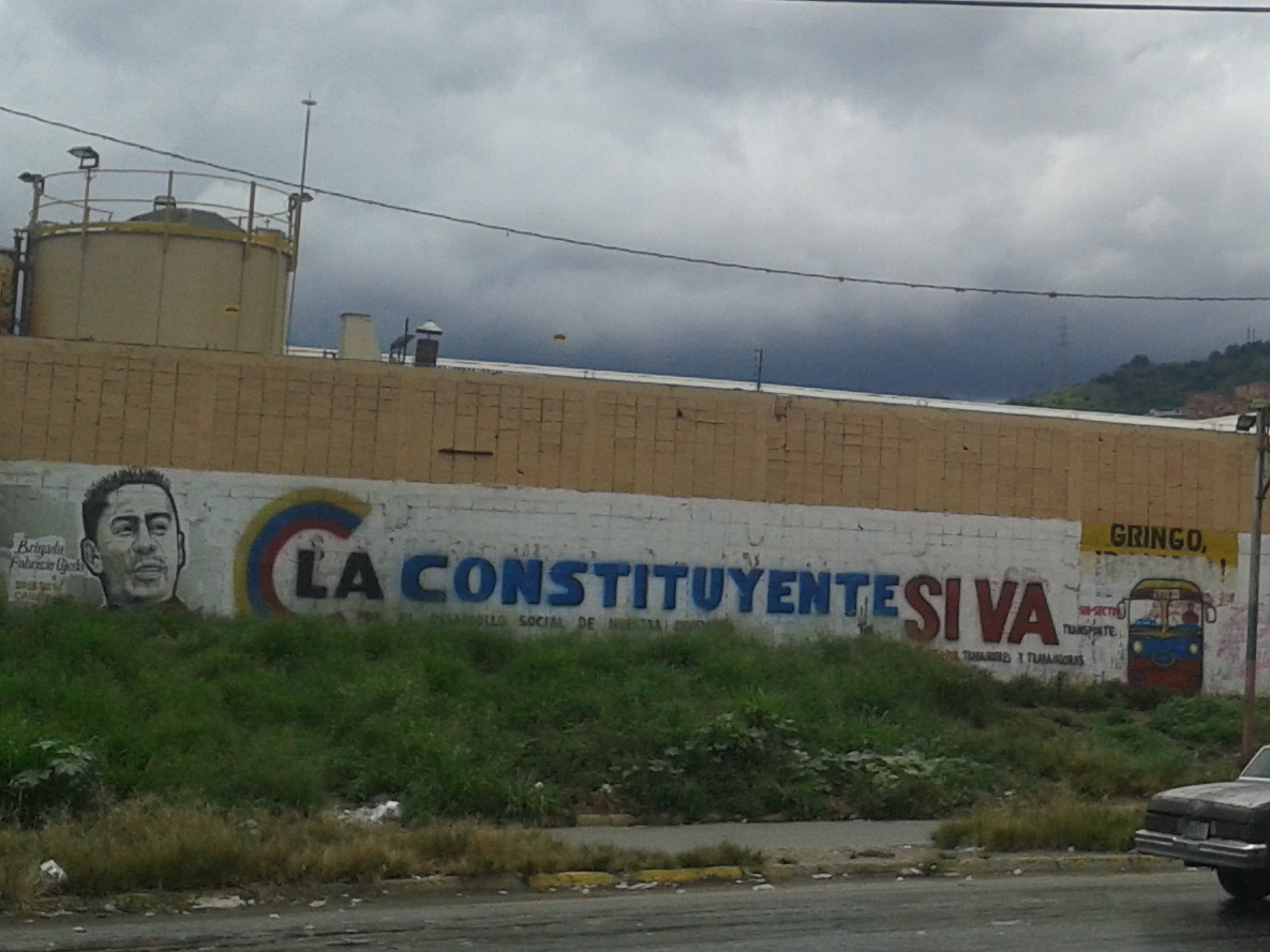 Mural en apoyo de la Asamblea Constituyente en Antímano, Caracas.